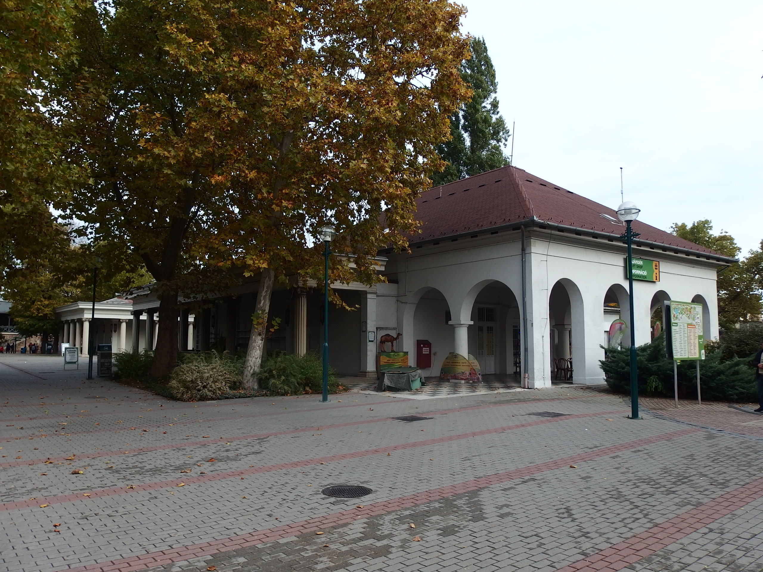 A lebontásra kerülő régi játékterem (Holnemvolt Park, Budapest)